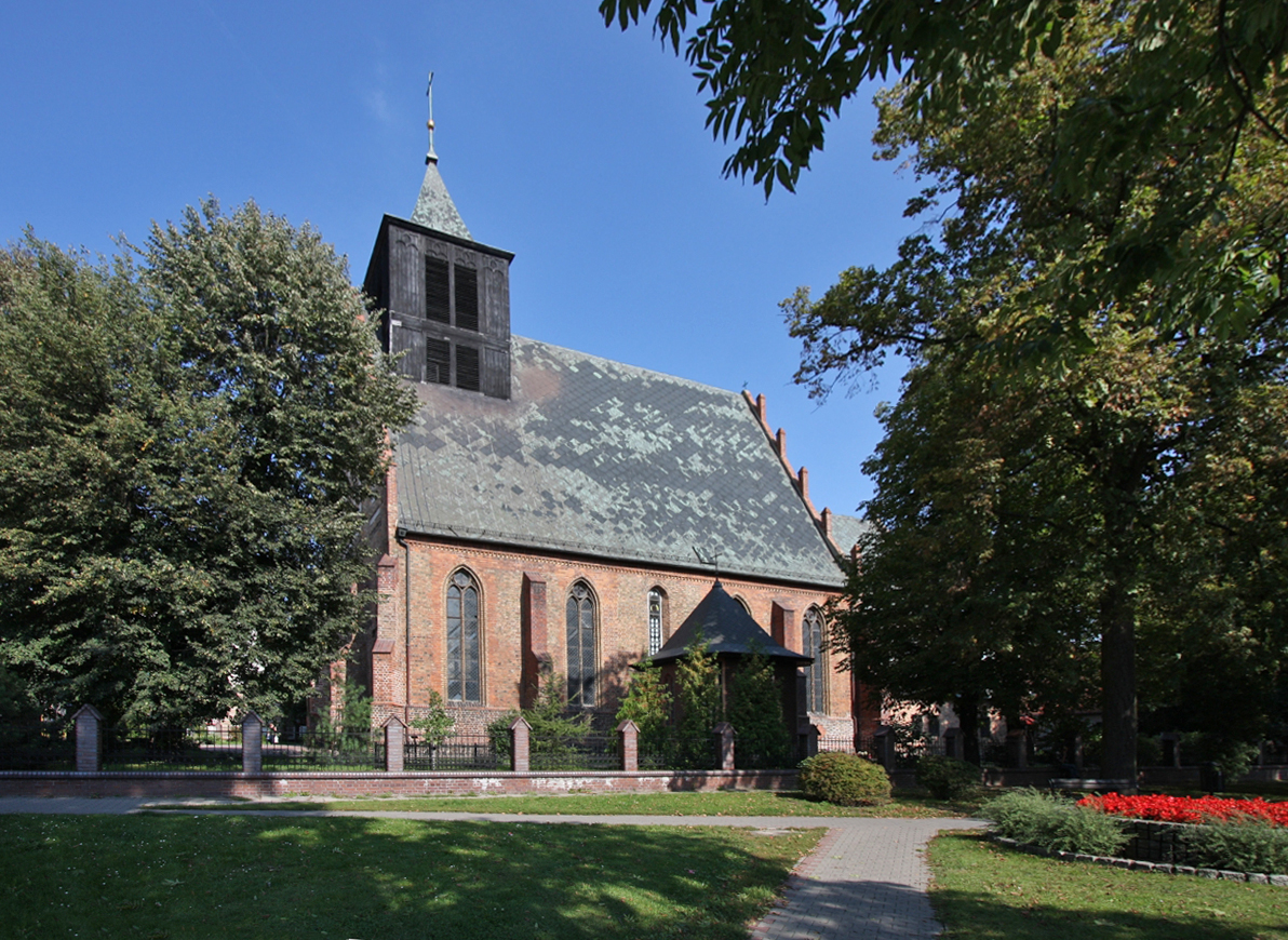 Międzyrzecz, kościół par. p.w. św. Jana Chrzciciela, mur., XIV/XV, 1862